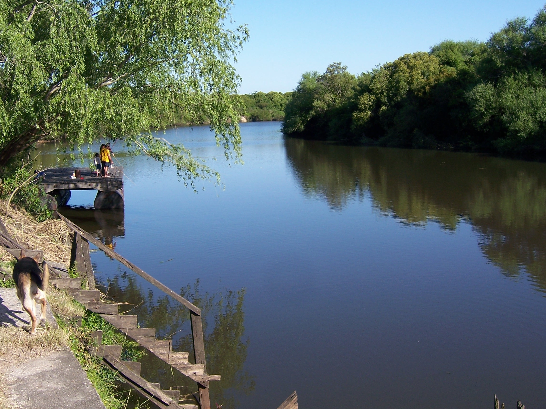 Puerto Concordia, ubicado sobre el Río Rosario, Departamento de Colonia, Uruguay. Por este puerto llegaron a la micro región de Rosario los más importantes contingentes de inmigrantes europeos, obligados a partir por la difícil situación económica que debían enfrentar hacia fines del siglo XIX.